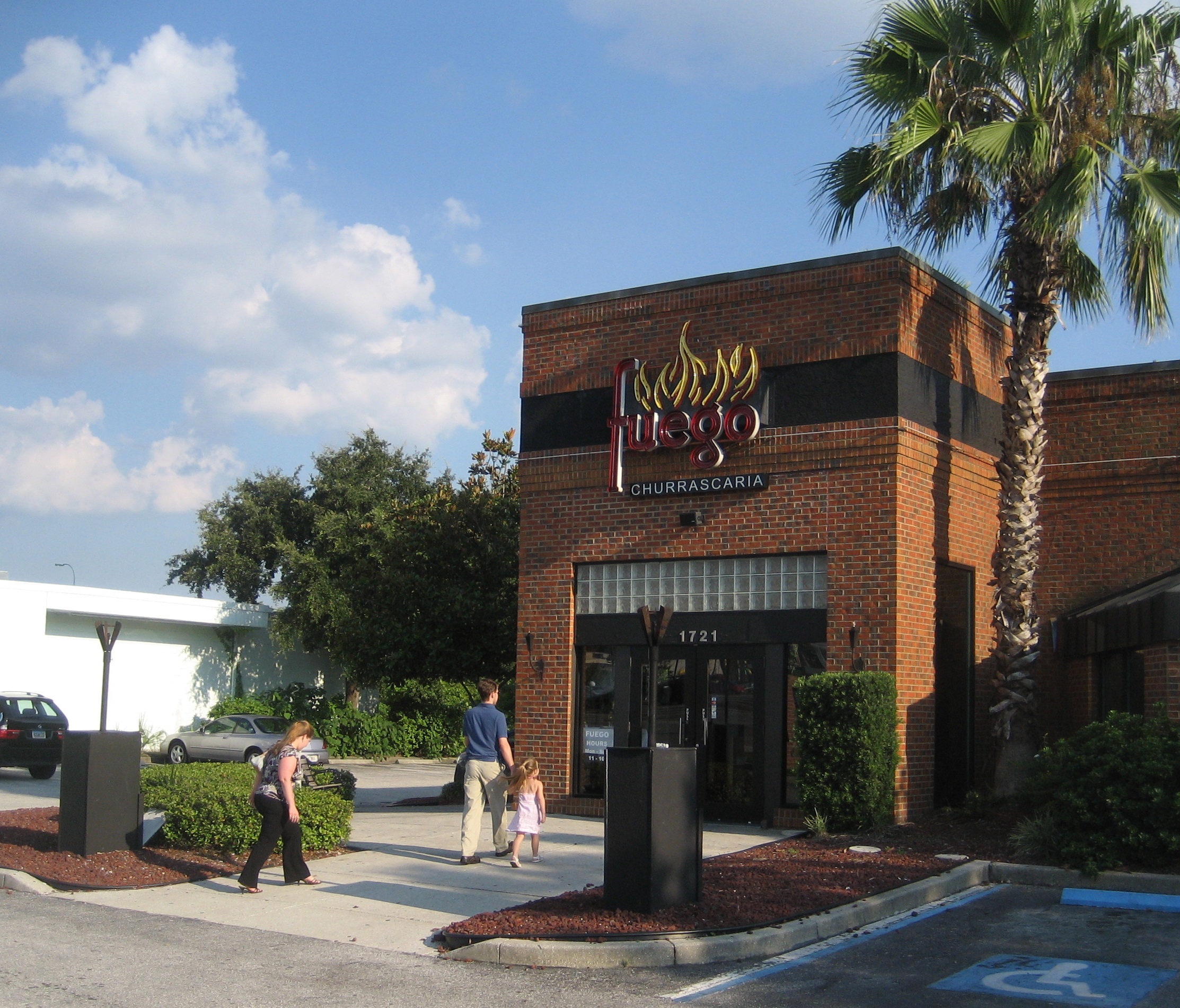 Brazilian restaurant in Brandon, Florida